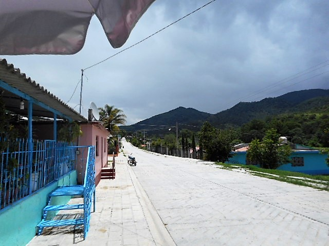 Avenida Rutilio Ruiz Hernández, San Juan Achiutla, Estado de Oaxaca, México.